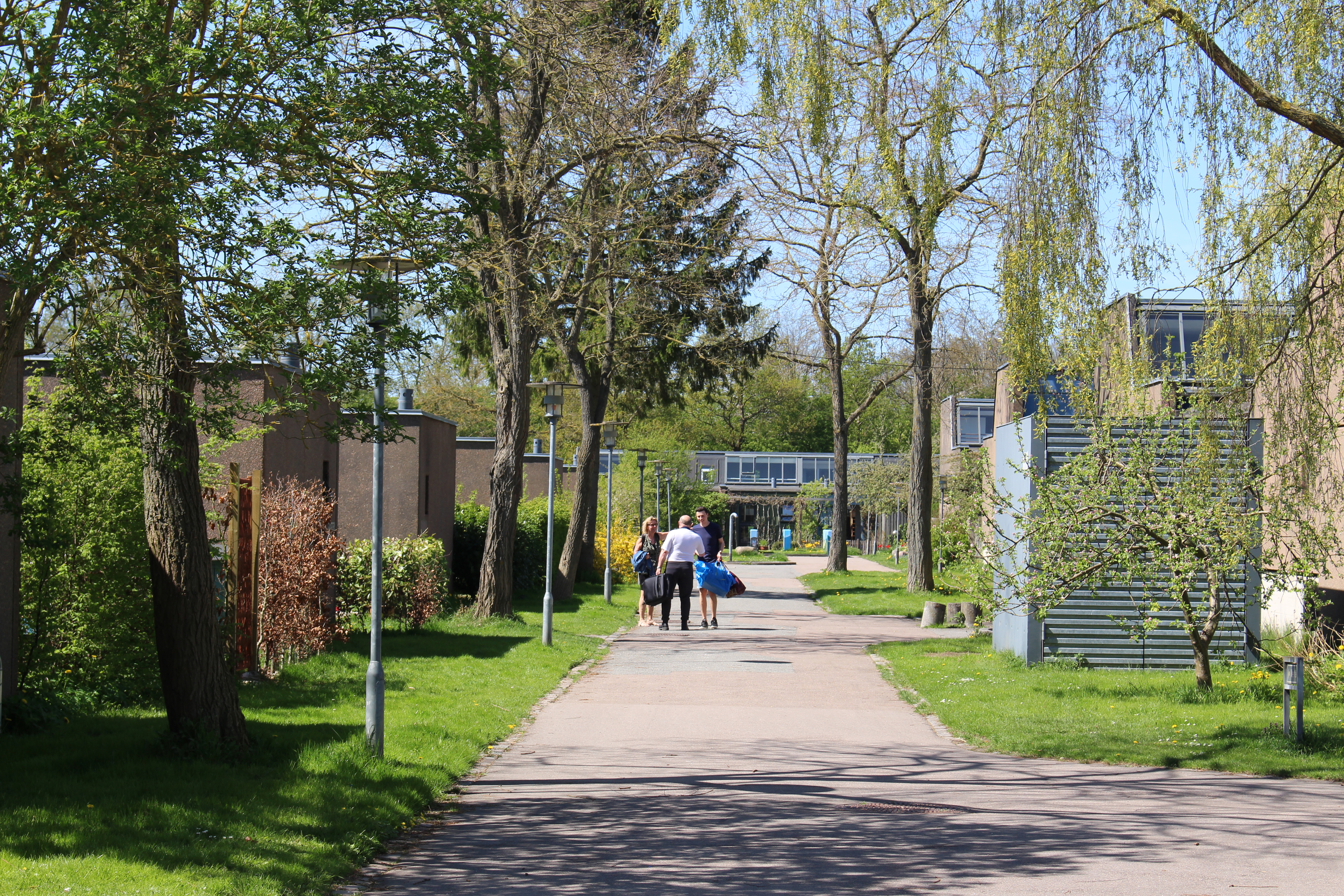 Galgebakken sti